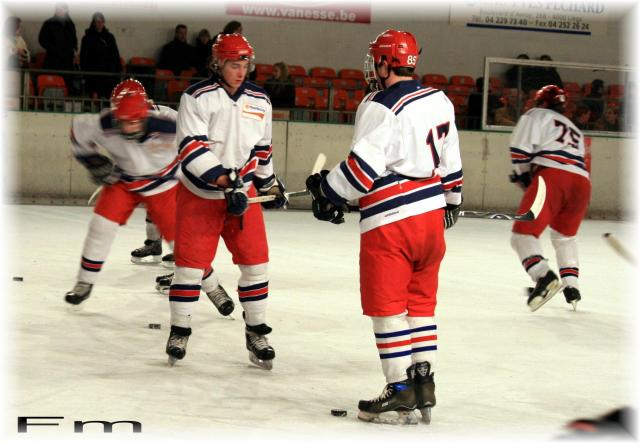 photo de match des bulldgos